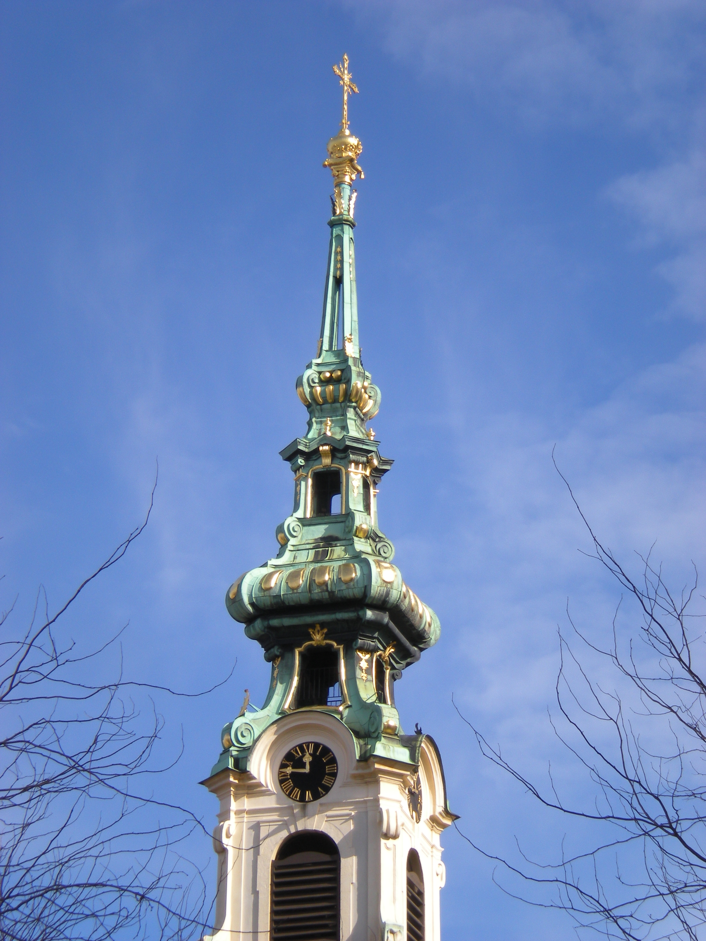 Die Stiftskirche in der Mariahilfer Straße in Wien